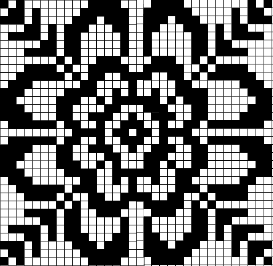 Motif norvégien Appelsina